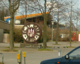 Vereinslogo des FC Sankt Pauli, im Eingangsbereich zum Millerntorstadion.